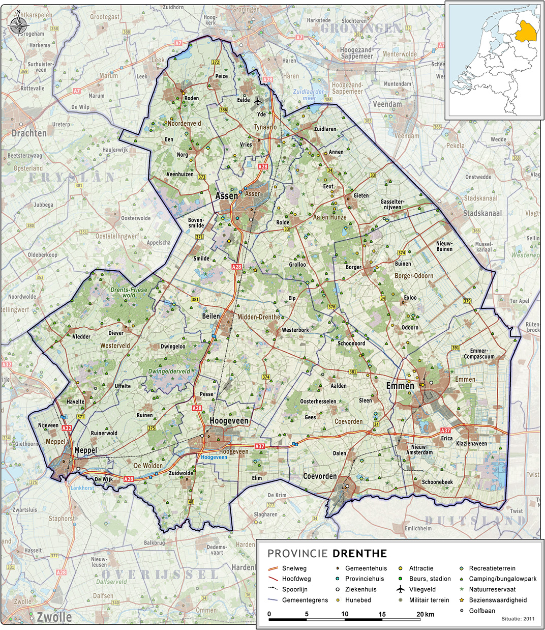 Provincie Drenthe, met indeling van gemeenten (2011) en impressie van het landschap. Door Jan-Willem van Aalst, samengesteld uit publiek beschikbare geo-data: Referentie-ondergrond (kustlijn, steden, wegen) gerasterd uit de OpenStreet Map OSM. ( Inhoud is beschikbaar onder de Creative Commons Attribution-ShareAlike 3.0 license. Referentie-ondergrond op water bewerkt vanuit Gebruik is vrij met bronvermelding NLR en ESA. Vectorgrenzen van gemeenten en regio's vrij ter beschikking gesteld met dank aan cartografen van brandweerregio's Hollands-Midden en IJsselland; gerasterd in Photoshop. Hoogte-aanduidingen (reliëf) gerasterd uit de AHN Viewer ( gebruik is vrij met bronvermelding (c) AHN, Locaties verblijfsrecreatie (campings) op basis van Borisweb ( van Kenniscentrum recreatie. Gebruik is vrij, met bronvermelding. Overige kenmerken op de kaart: eigen tekenwerk van Jan-Willem van Aalst, op basis van gerasterde gemeentegrenzen.